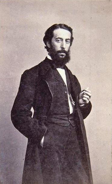 Retrato de Dióscoro Puebla